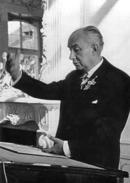 Alexander Rüstow ca. 1960 in einem Vortrag der Aktion Soziale Marktwirtschaft